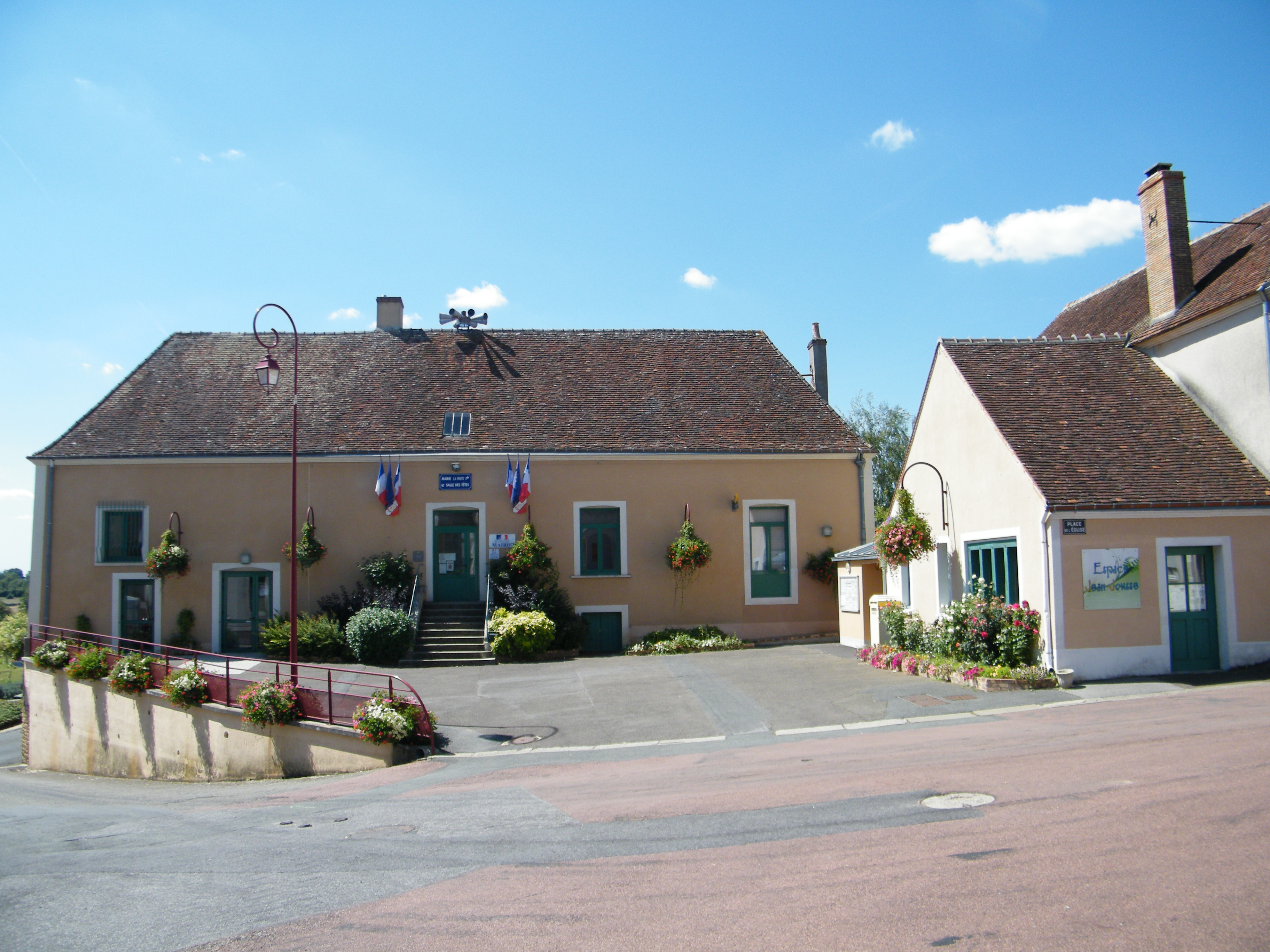 Gréez-sur-Roc, Sarthe, Fr, mairie (2)